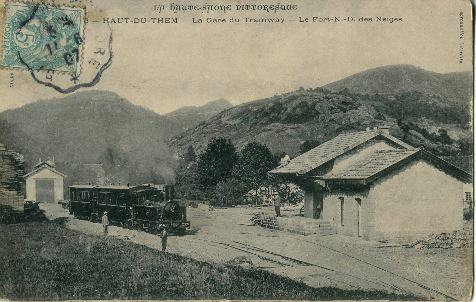 Carte postale ancienne sans mention d'éditeur, collection La Haute-Saône illustrée : HAUT-DU-THEM - La gare du Tramway - Fort N. D. des Neiges